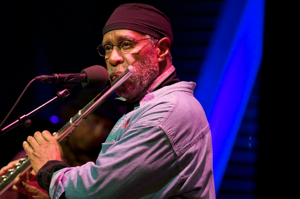 Bennie Maupin (Detroit (Michigan), 29 april 1940) is een Amerikaanse jazzmusicus. Hij bespeelt de (tenor)saxofoon, basklarinet en dwarsfluit.